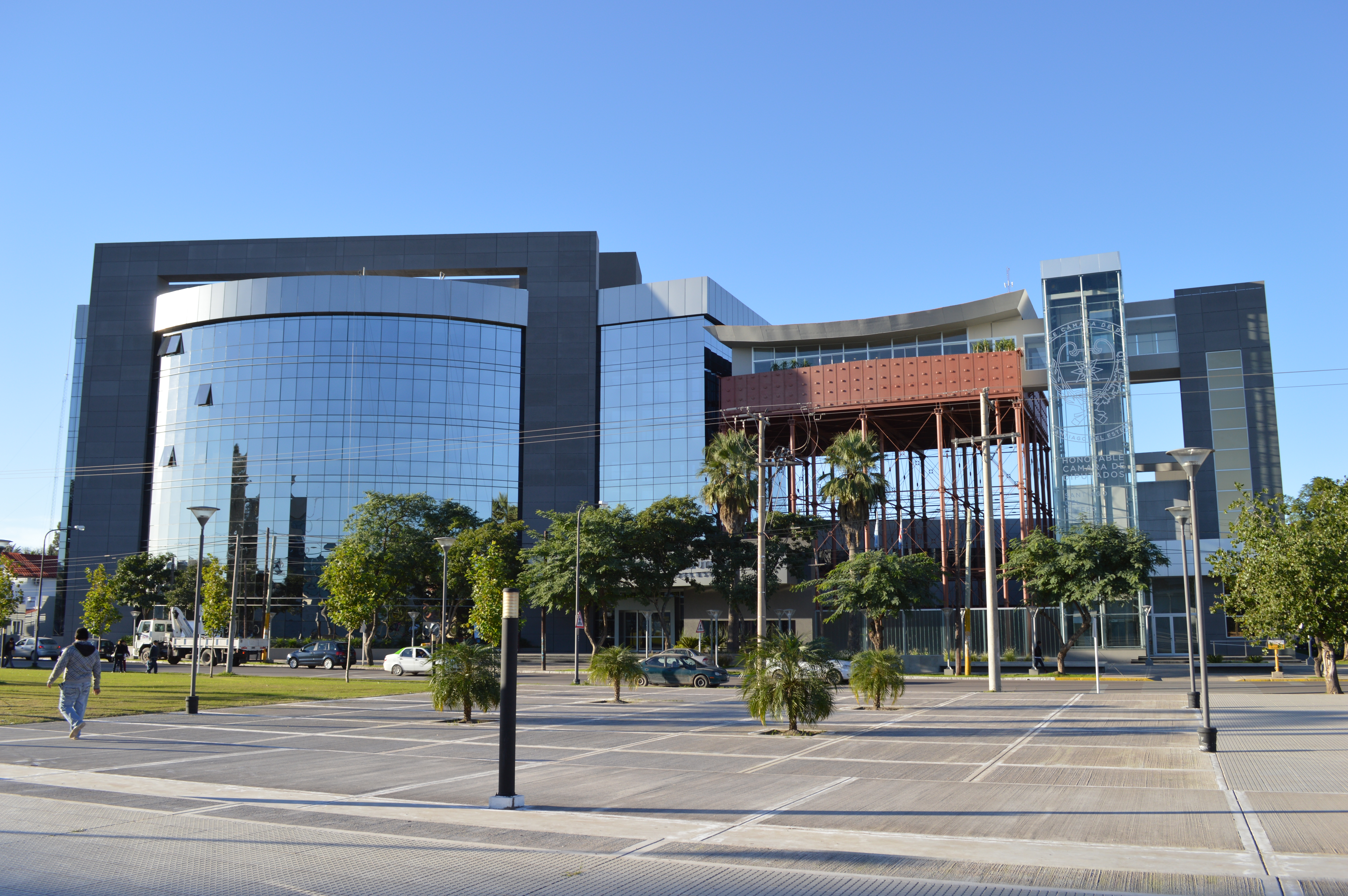 Nuevo Edificio del Poder Legislativo de la Provincia de Santiago del Estero, Argentina.